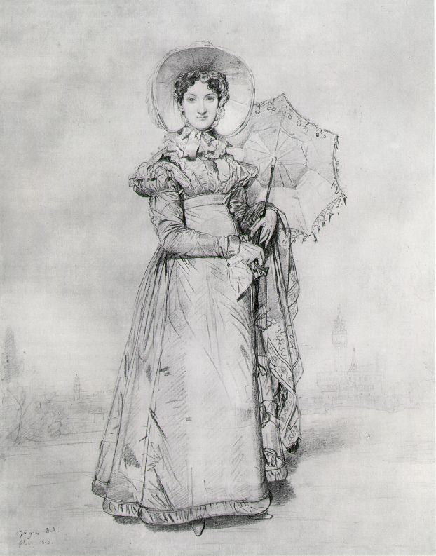 El taller de Ingres en Florencia prontó se llenó de encargos, en su mayoría de grandes personajes del ejército y la diplomacia napoleónica. Entre los clientes de Ingres estaba la "belle Thérèse", condesa Nogarola, una de las damas más admiradas en París. Era la esposa del embajador de Austria, el conde Apponyi, e Ingres la retrata de manera similar al dibujo de madame Leblanc. El conde también fue retratado por el pintor. Al fondo del dibujo podemos ver un sutil paisaje de la ciudad florentina, con la torre de Badía y el Ayuntamiento.